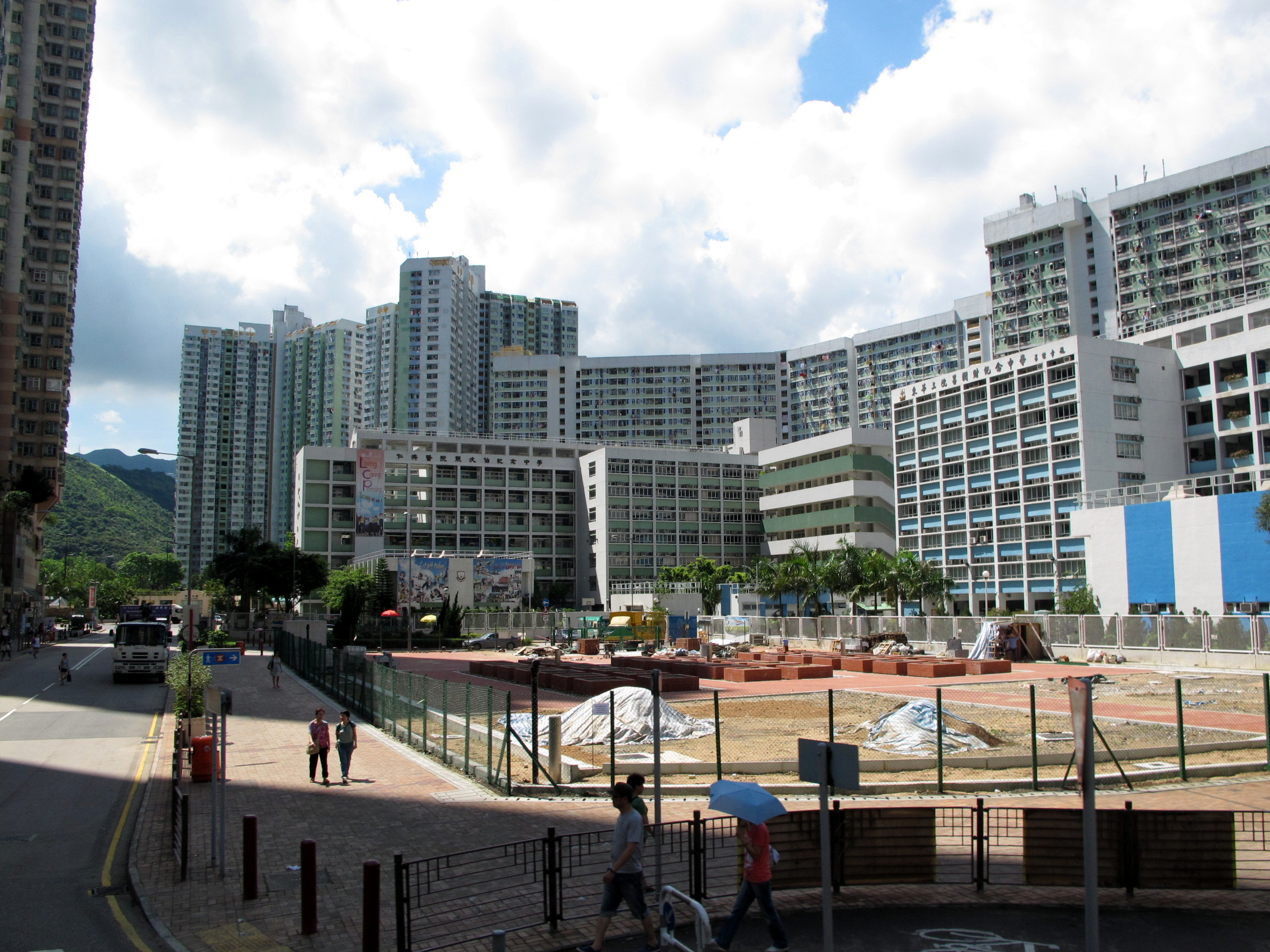 Po Lam Estate